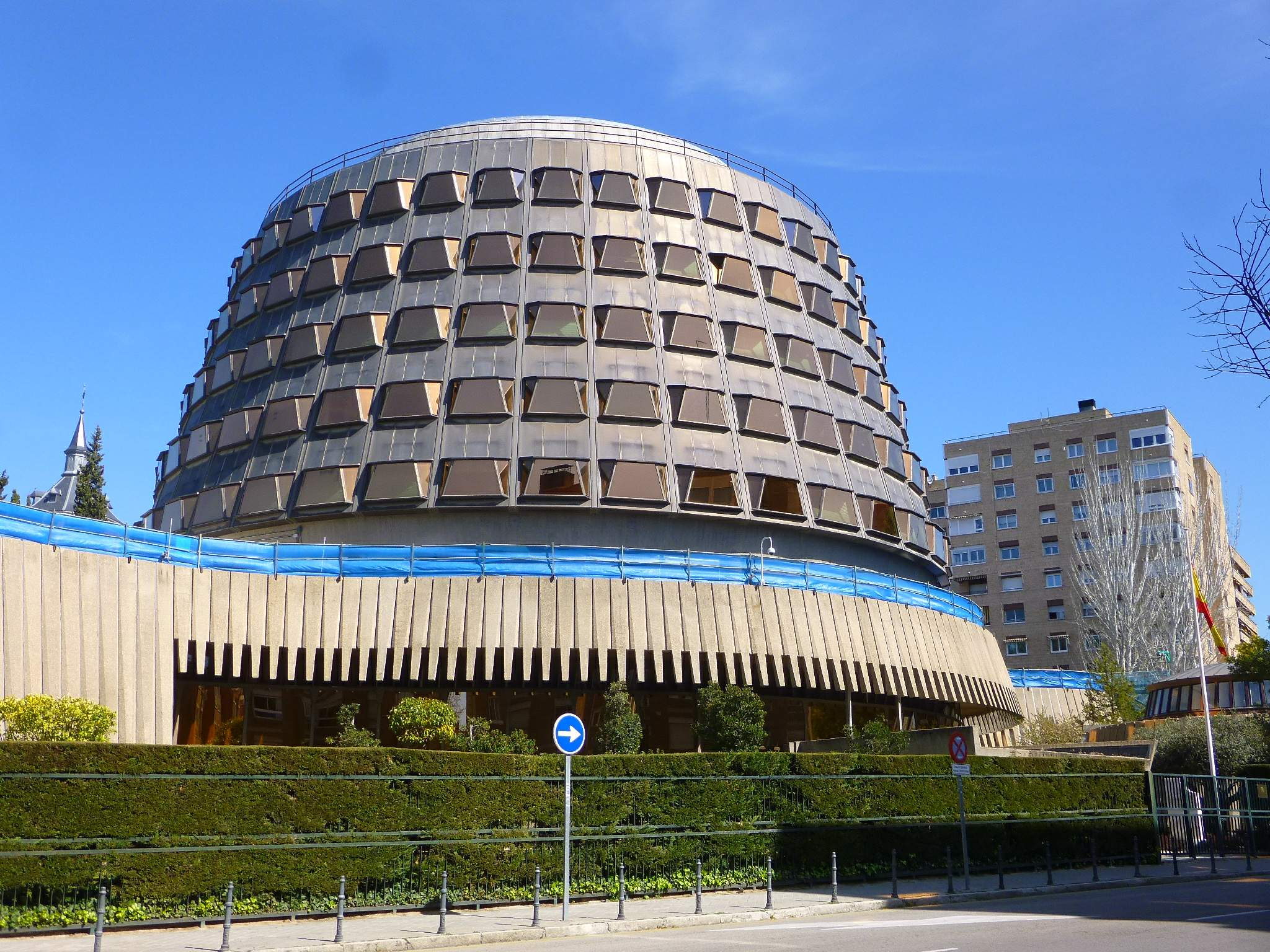 Tribunal Constitucional de España (Madrid)